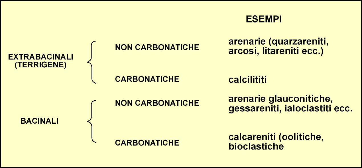 Classification of arenitic rocks